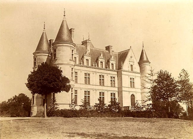 Chateau de la Donneterie, Archives Garnier-Savey